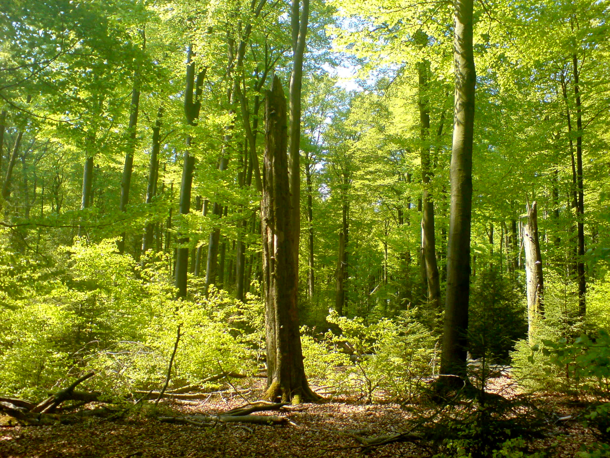 Buchenaltholzbestand im Hochsolling.